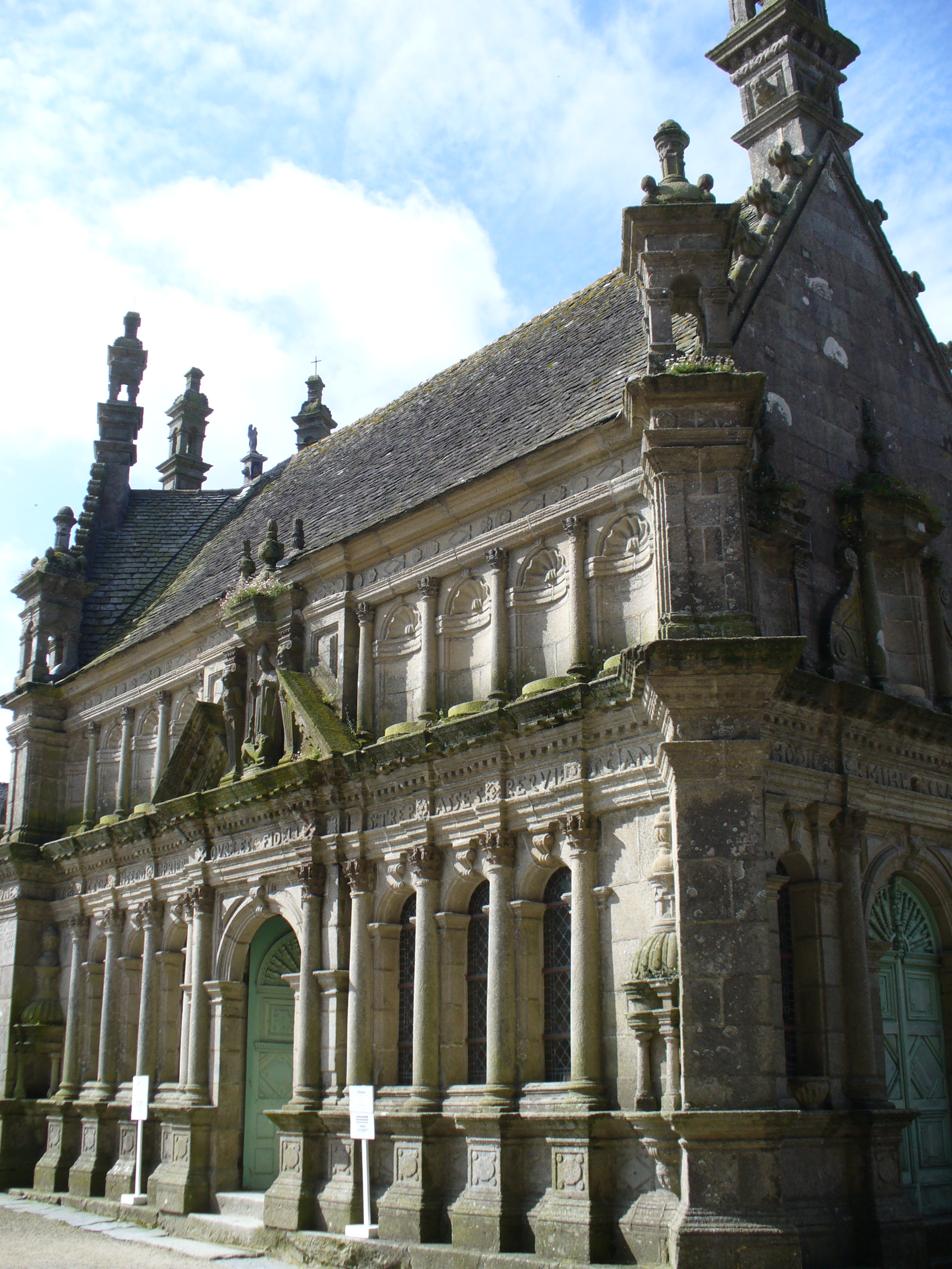 .Das zweigeschossige Beinhaus(ossuaire 1676-1682) von St.Thegonnec in dessen Krypta eine Darstellung des Heiligen Grabes zu sehen ist stellt einen Höhepunkt bretonischer Kunst der Renaissance dar